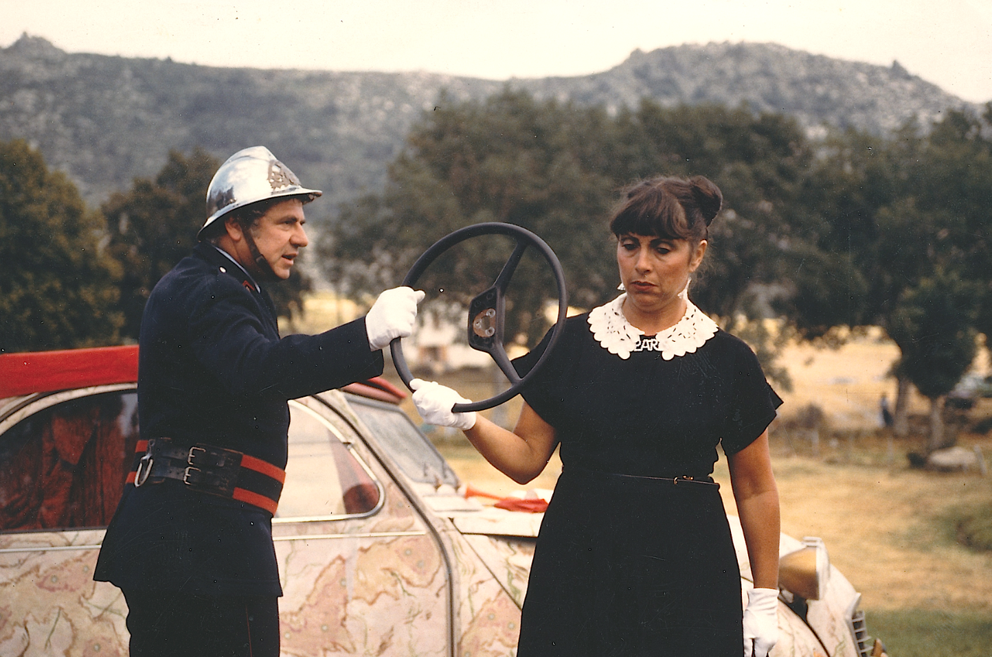 Jacques Livchine et Hervée Delafond avec leur spéctacle " La 2CV Théatre"